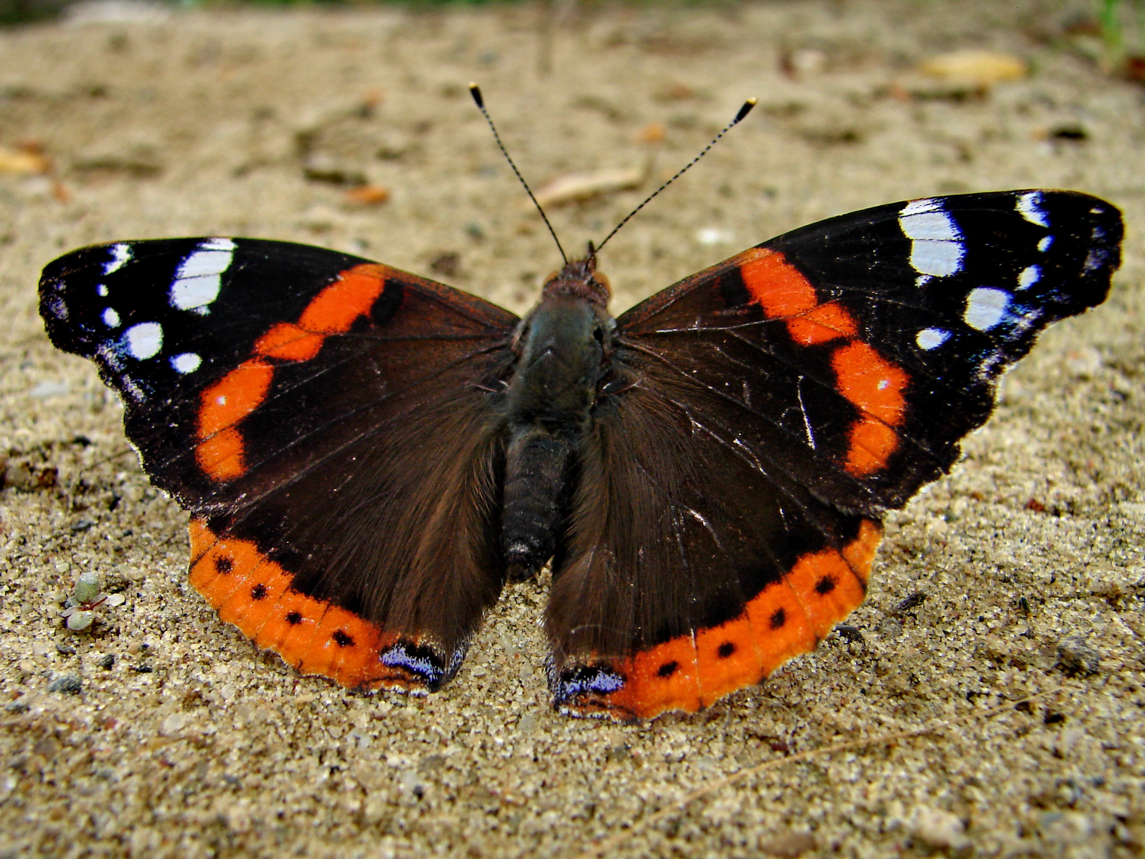 Atalantalepke egy Környe melletti tó partján